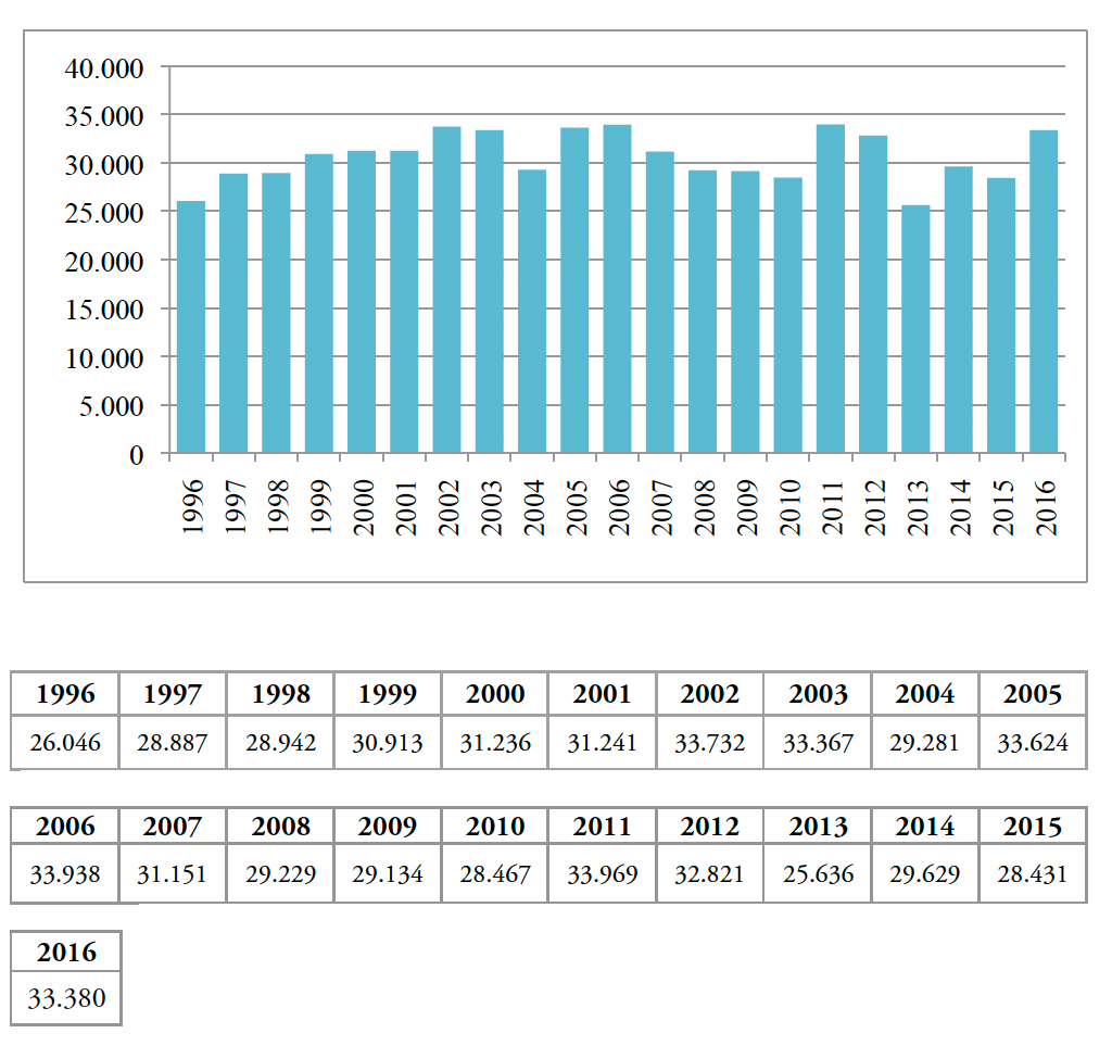 Tabella coi dati delle affluenze del Parco archeologico di Elea-Velia indicati nel sito ufficiale del MiBACT